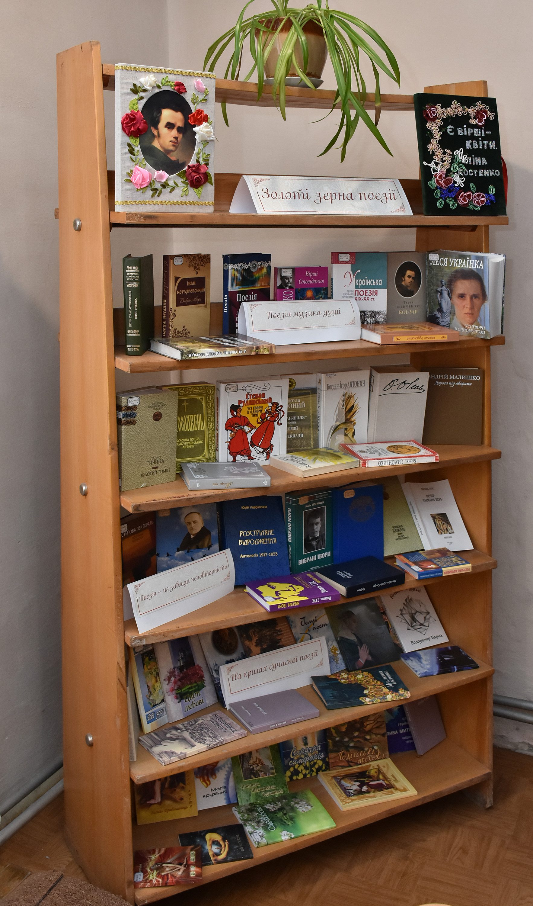 Бібліотека № 8 для дорослих Тернопільської міської централізованої бібліотечної системи.